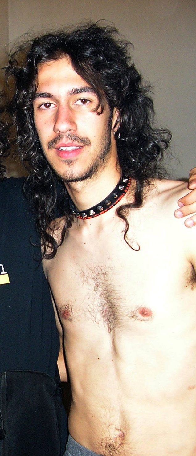 El cantautor sevillano Poncho K, en el backstage de la Sala Arena (actualmente Sala Heineken) de Madrid tras un concierto.